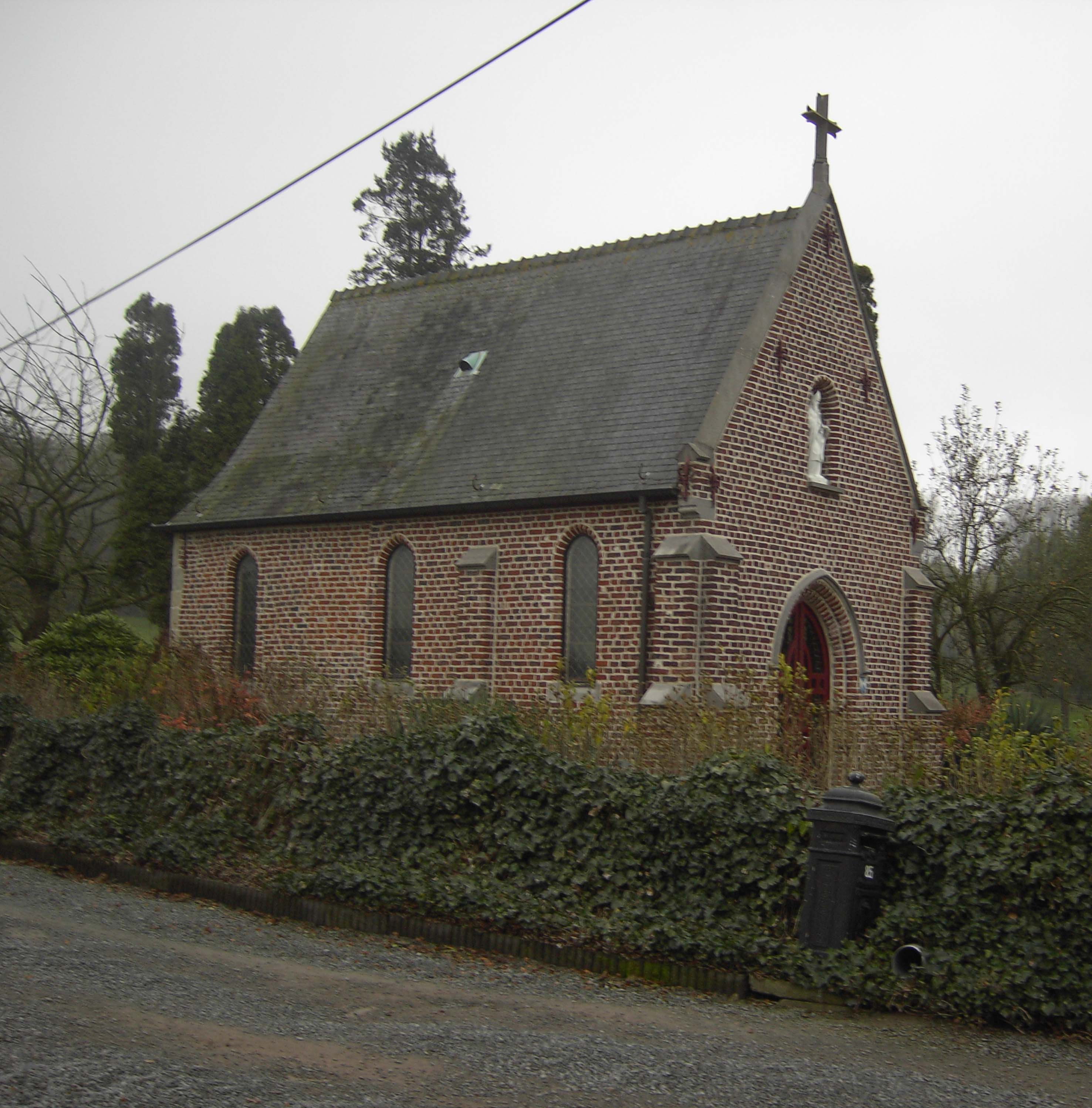 Sint-Livinuskapel - Sint-Lievens-Houtem - Oost-Vlaanderen - België.